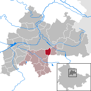 Sprötau in Thuringia - District Sömmerda